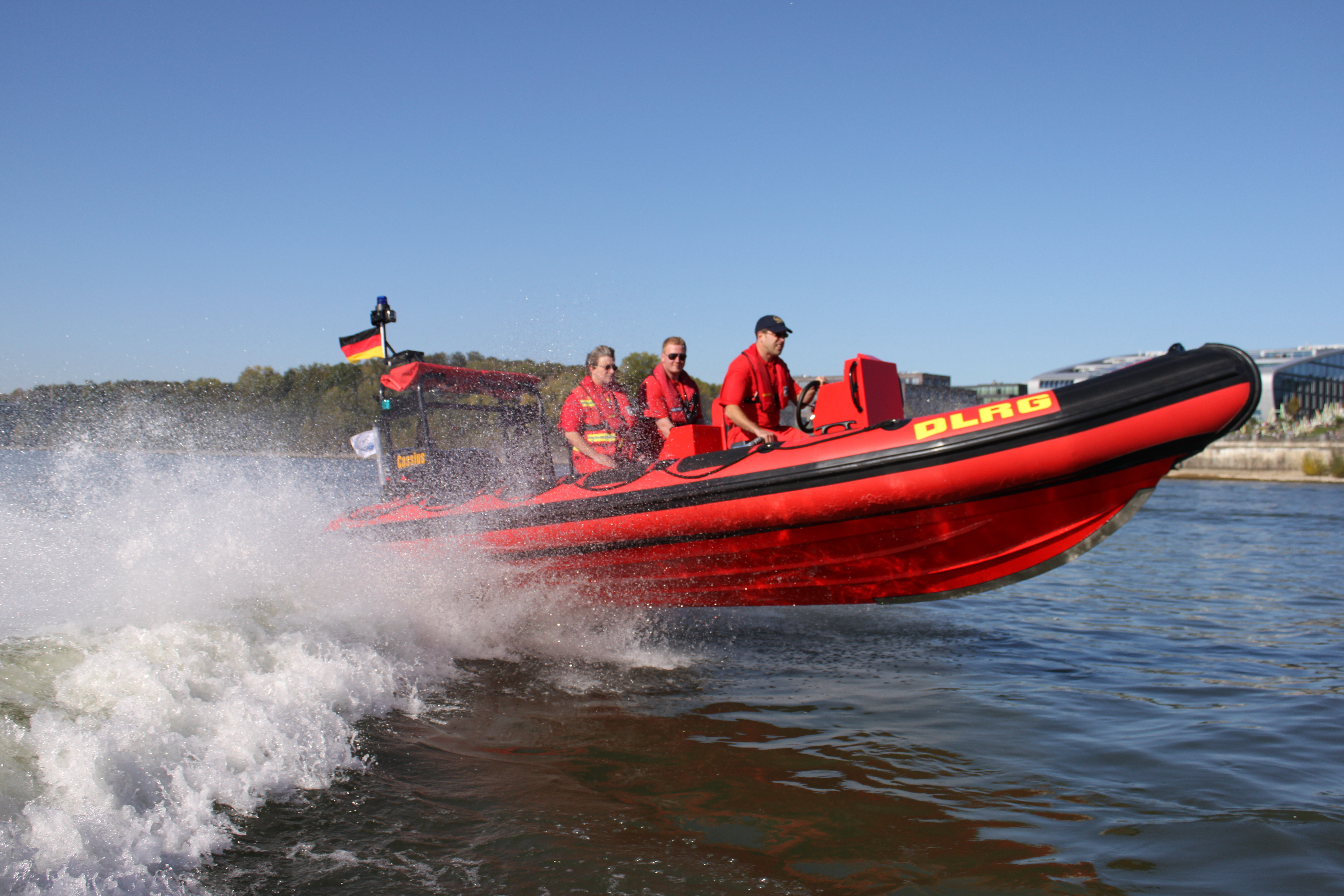 Motorrettungsboot auf dem Rhein bei Bonn im Einsatz / Hersteller: Ribcraft, UK